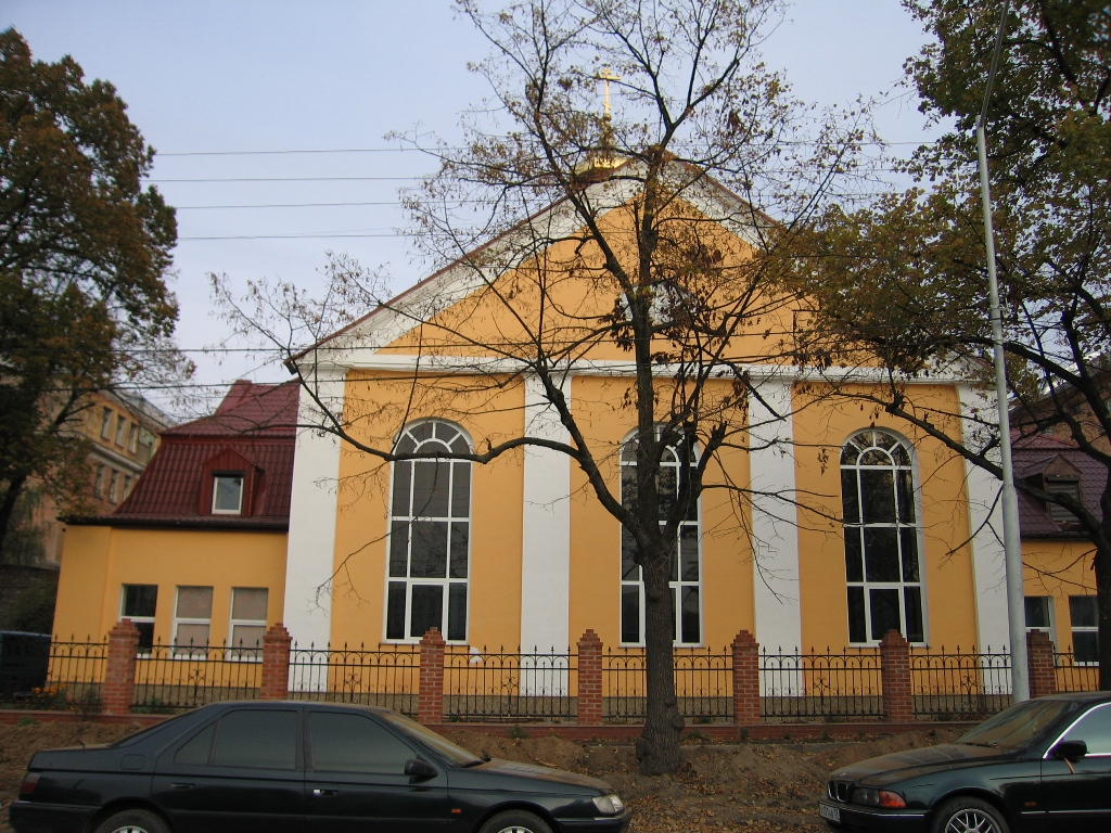 Tragheim_Haus